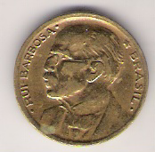 Verso da moeda de 20 centavos de Cruzeiro BRZ (1942~1967). Cunhada em 1953. This PNG graphic was created with GIMP.